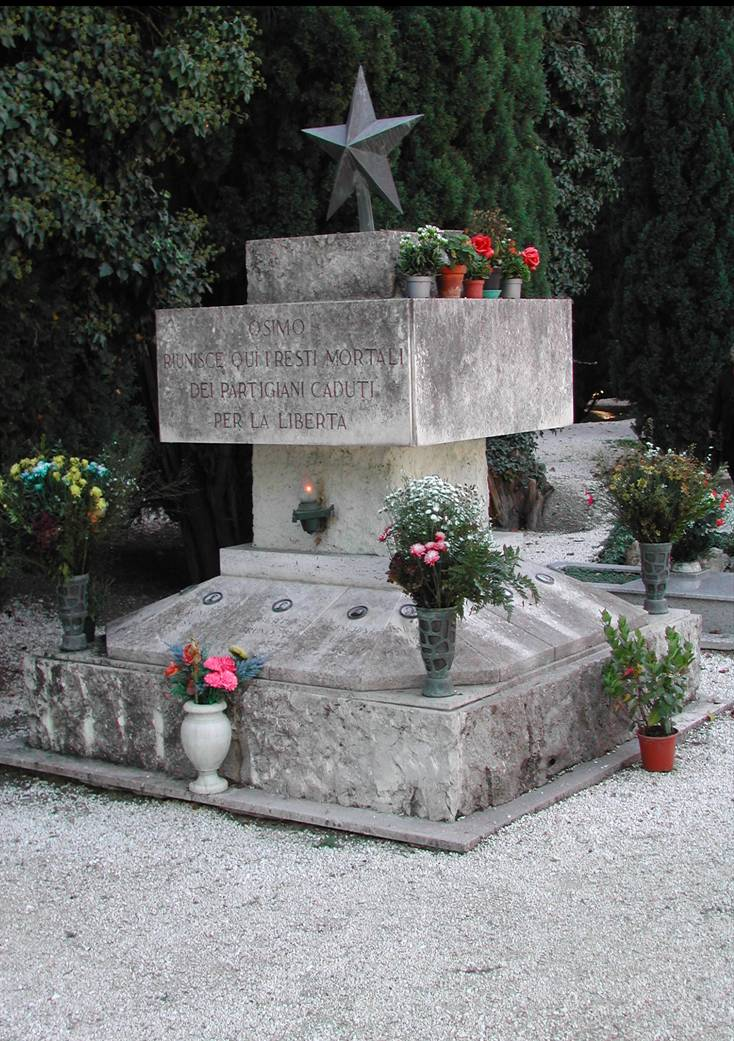 Tomba monumentale al cimitero di Osimo ai partigiani osimani caduti